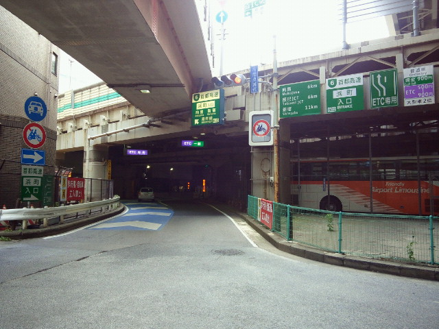 首都高速浜町入口